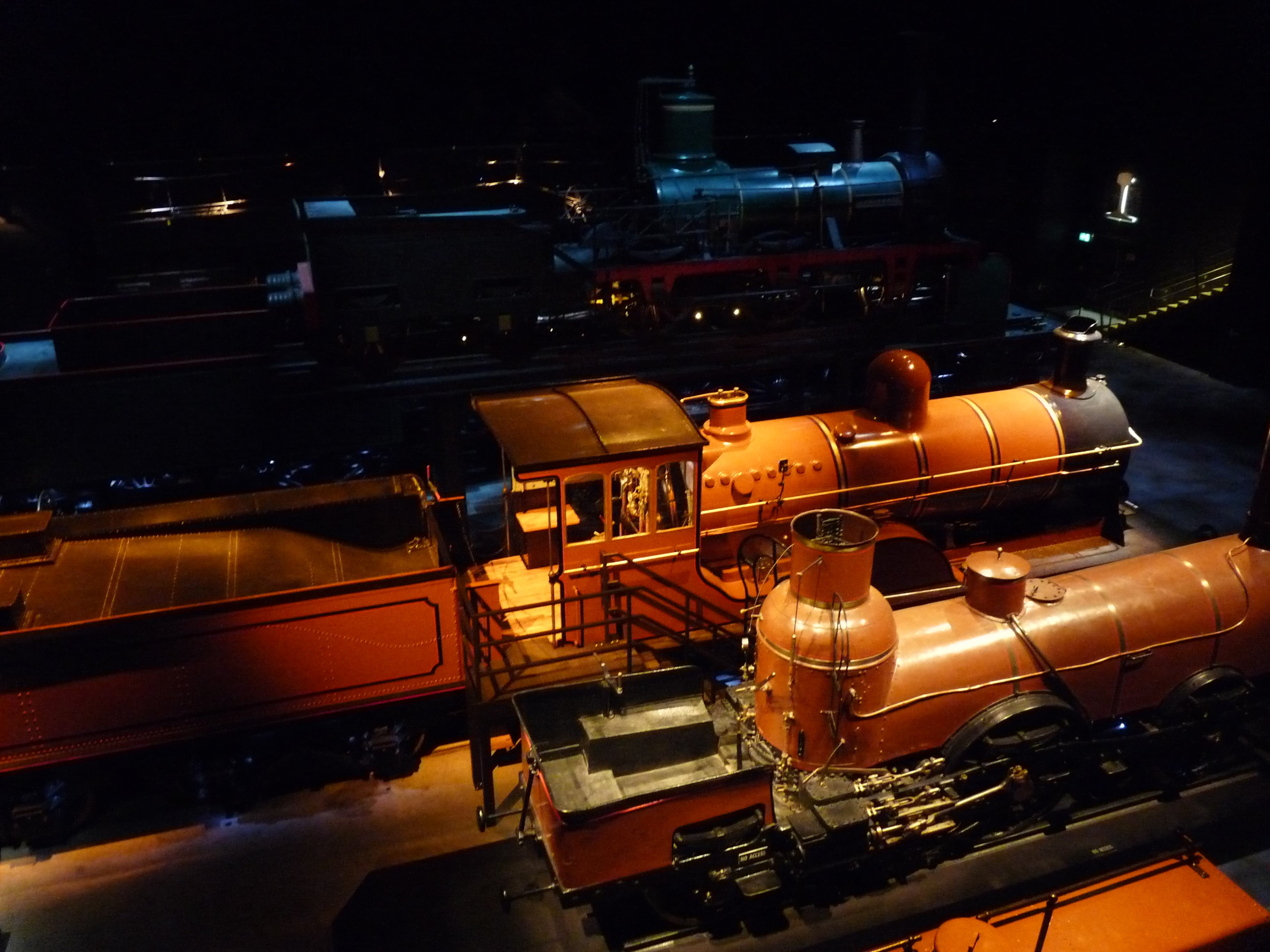 Oude Belgische stoomlocomotieven in Train World